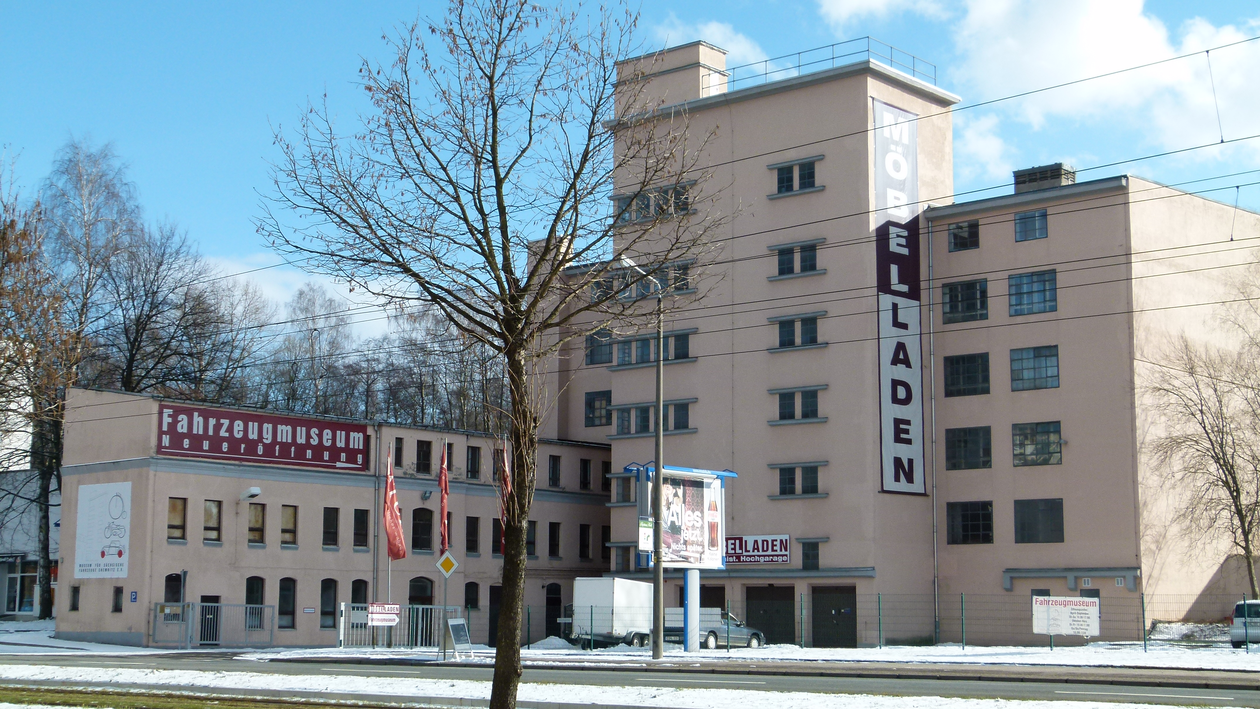 Denkmalgeschützter Garagenhof in Chemnitz, Zwickauer Straße 77, Fahrzeugmuseum